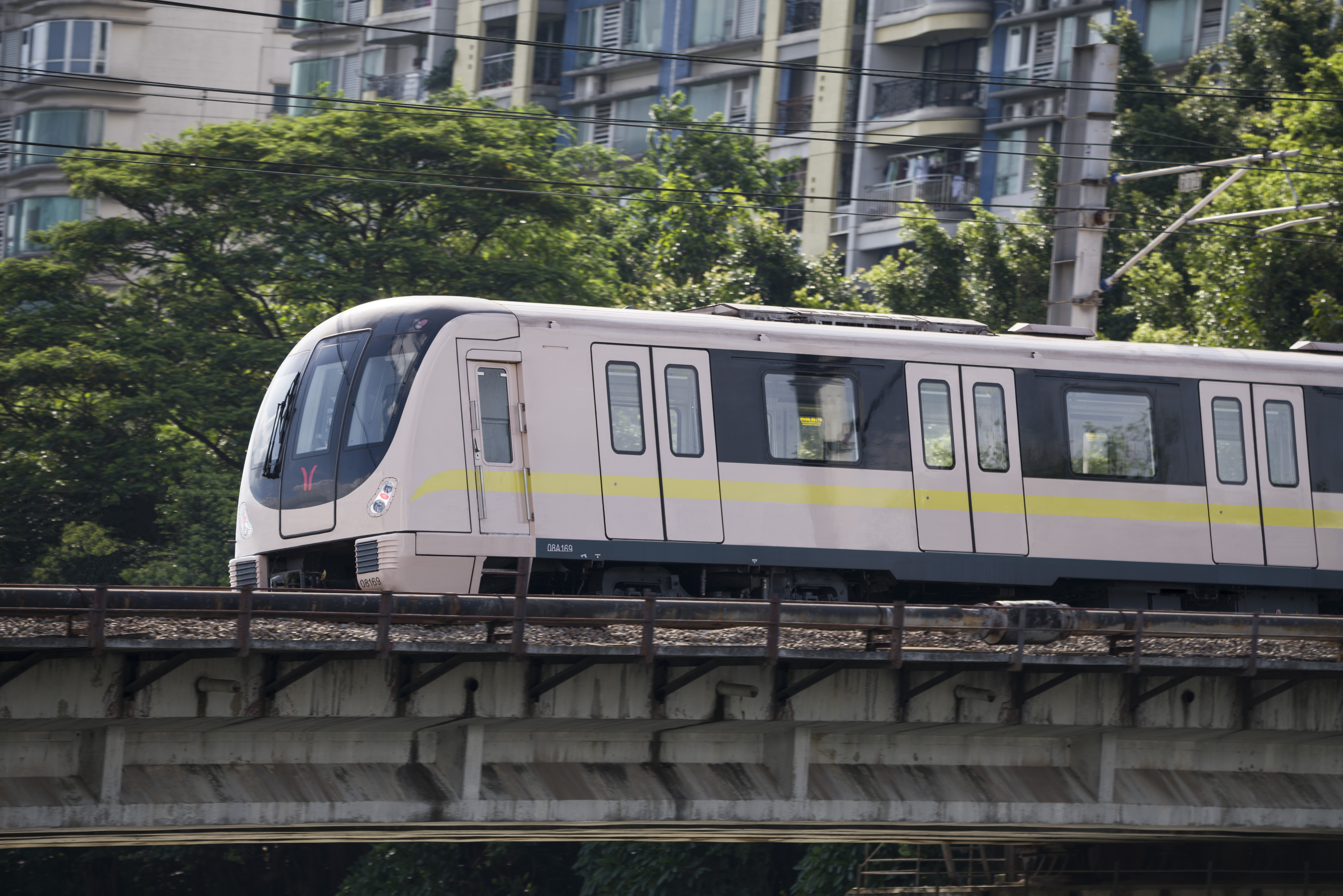 广州地铁8号线A6型列车在赤沙车辆段